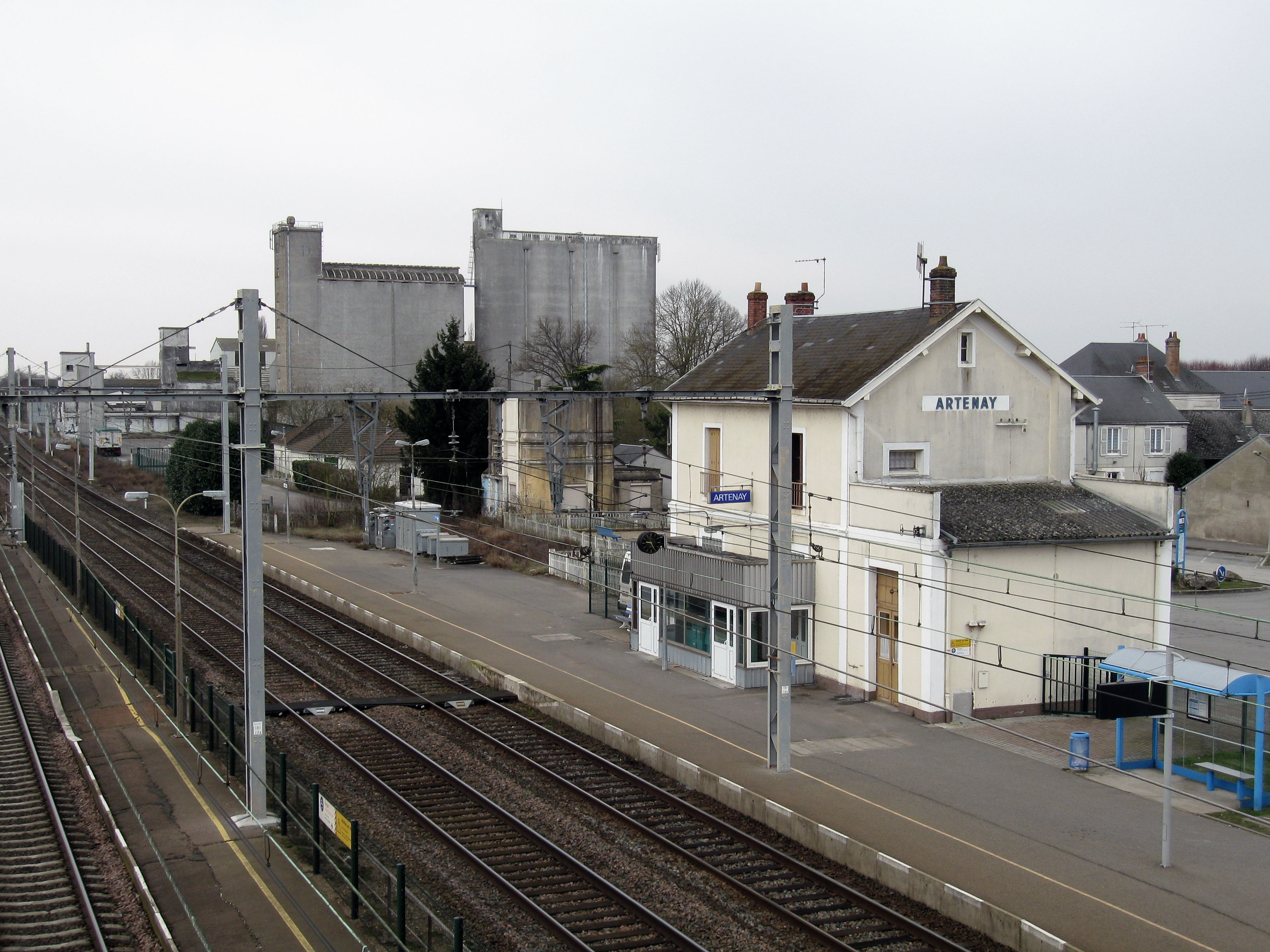 Gare d'Artenay, Loiret, France